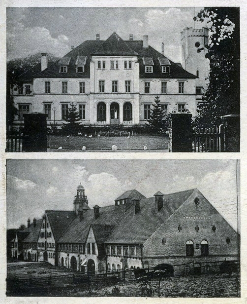 Gut Düssin, Gutshaus und Viehaus